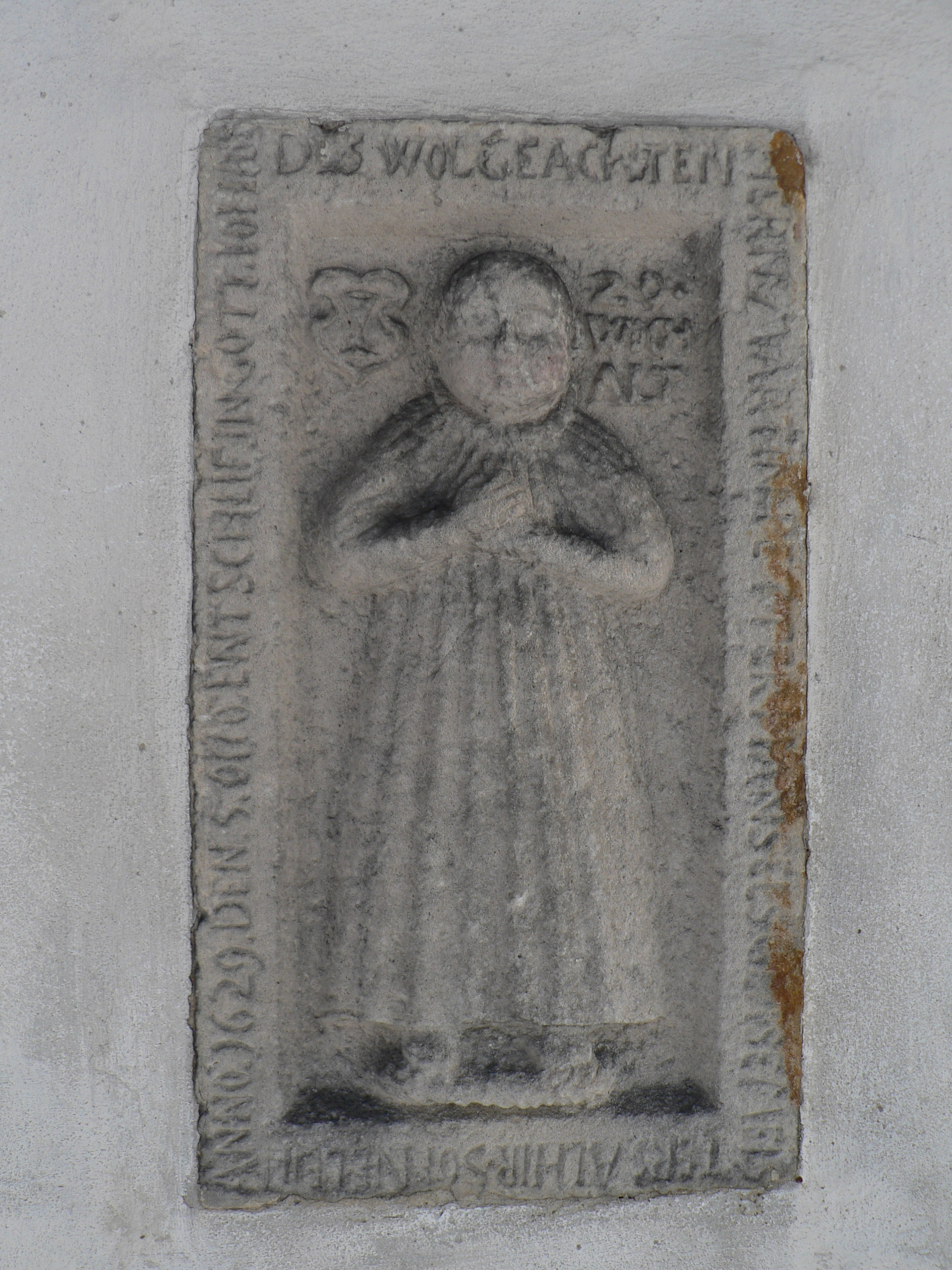 Náhrobek z roku 1629 na vnější zdi kostela